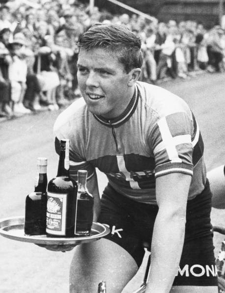 Palle Lykke